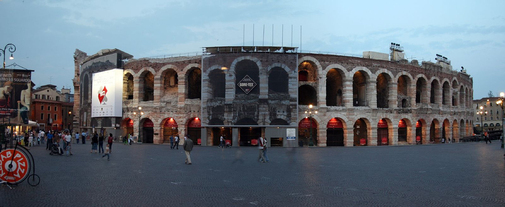 Verona, Veneto, Italia